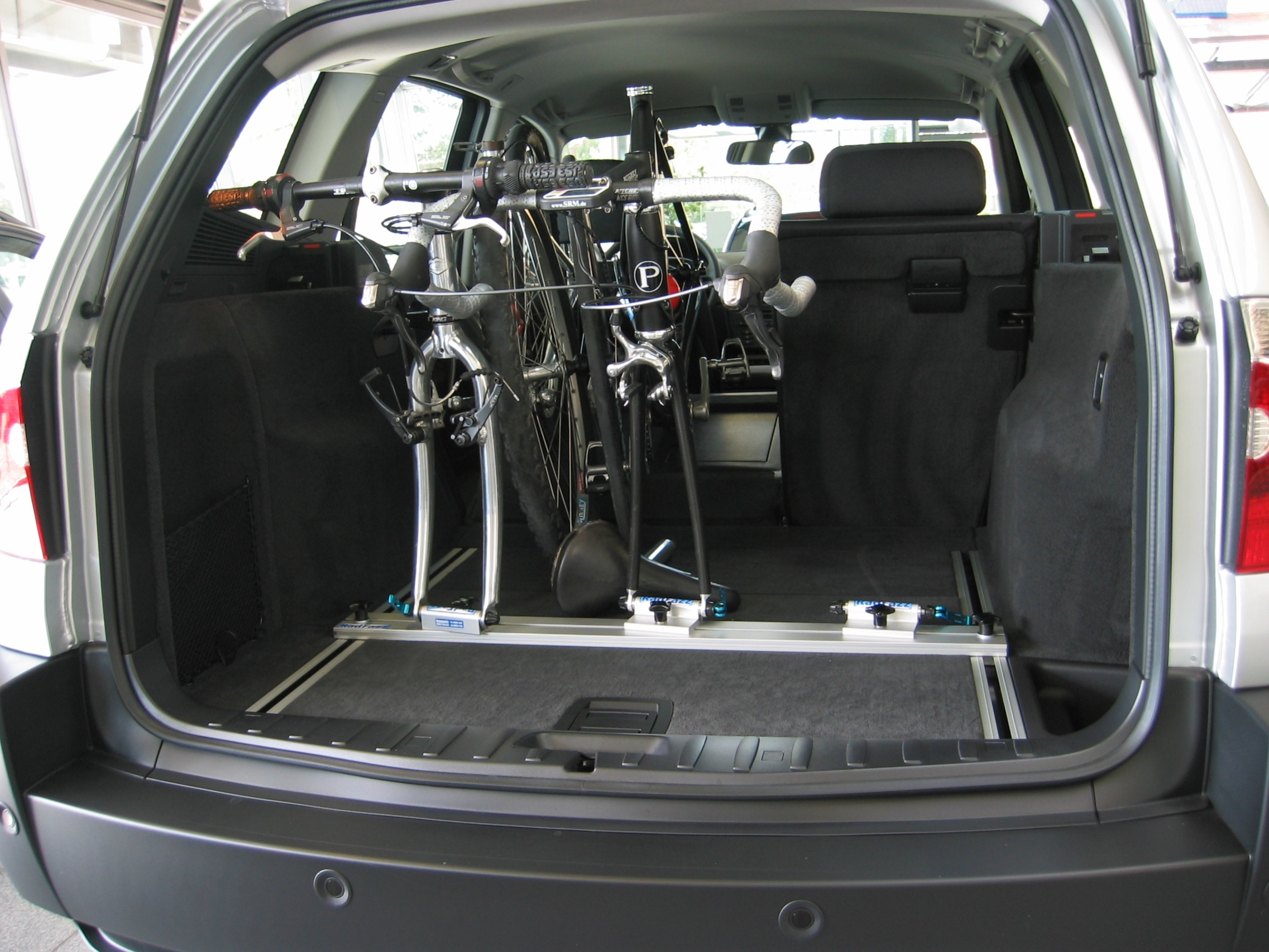 RadFazz Schienensystem im BMW X3